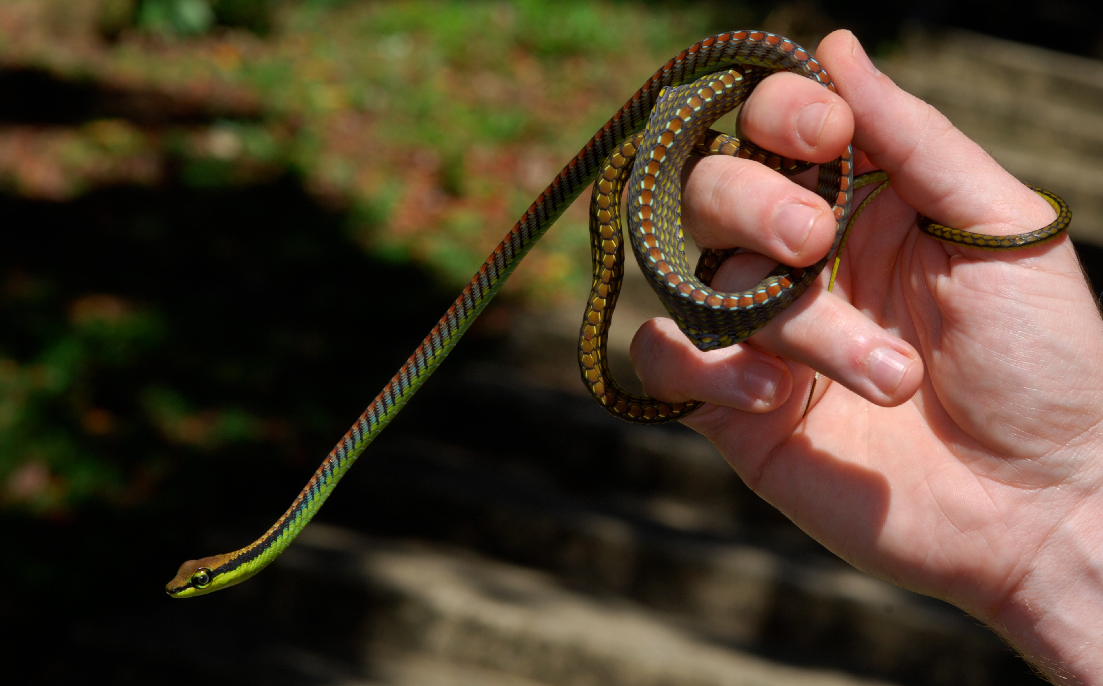 Taman Negara NP, Pahang, MALAYSIA